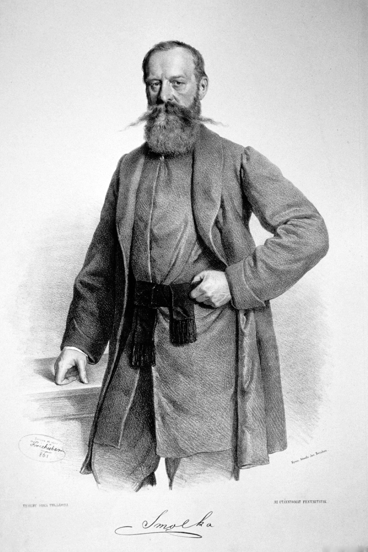 Franciszek Smolka (1810-1899), polnischer Politiker. Lithographie von Josef Kriehuber, 1861 (Wolfgang v. Wurzbach 2103 (Werksverzeichnis der Porträtlithographien Josef Kriehubers))